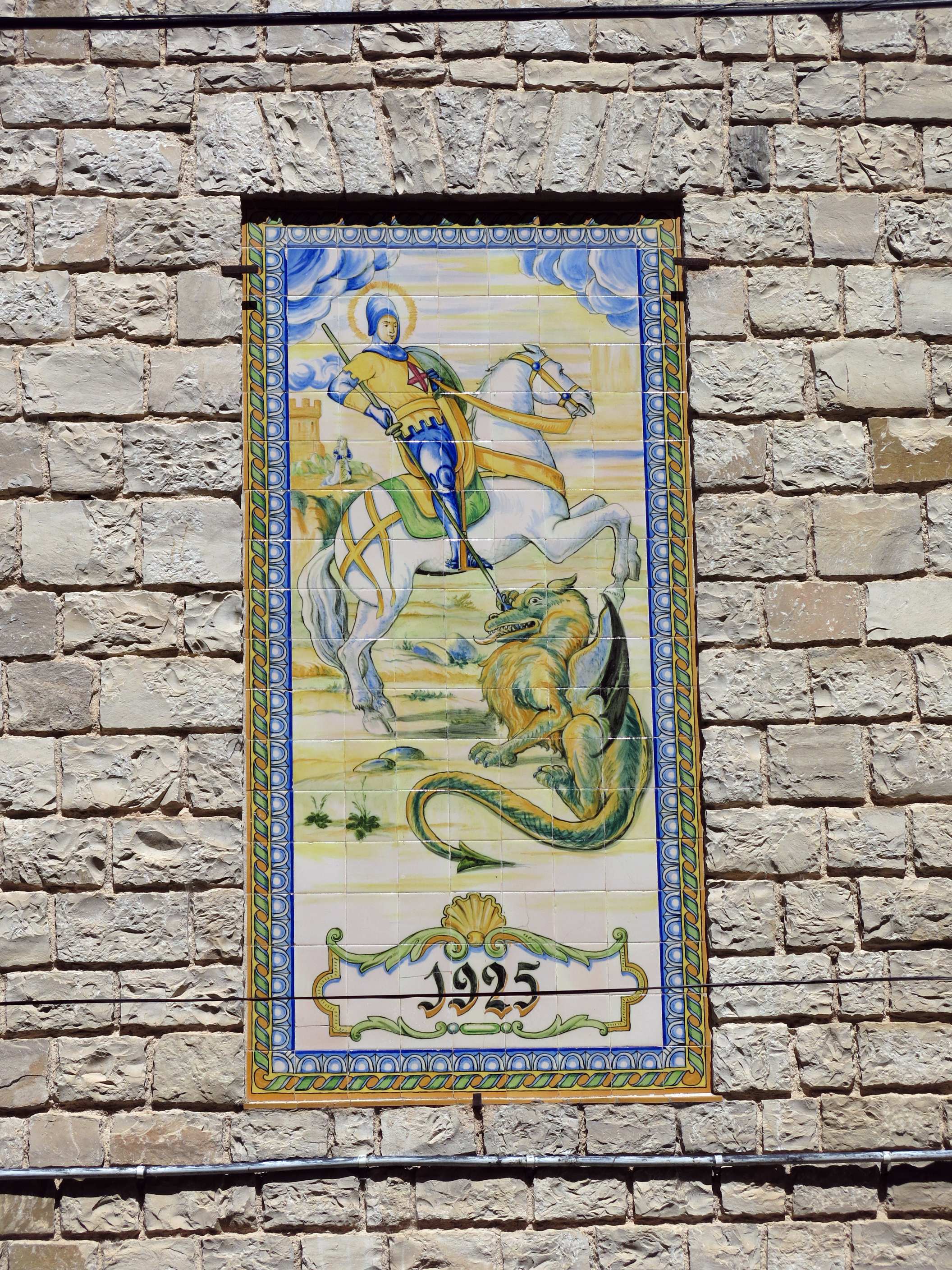 Xalets Montserrat i Sant Jordi (Vallfogona de Riucorb)